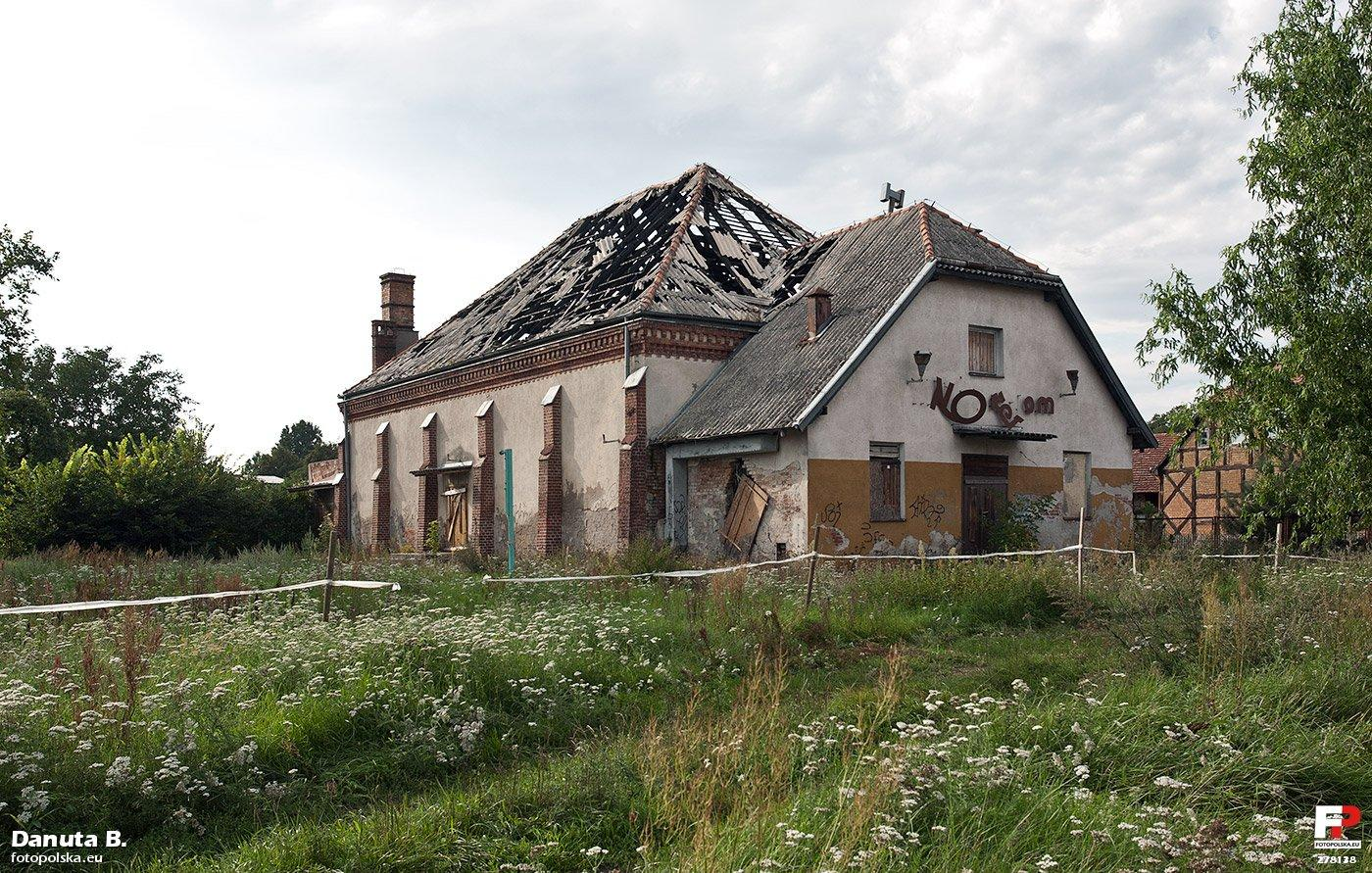 Przedwojenny budynek kina. Chyba dawno zaprzestano działalności. Współcześnie sprzedany w prywatne ręce. W lutym 2011 r. doszło do pożaru. Nie mogłam nigdzie znaleźć nazwy tego kina.